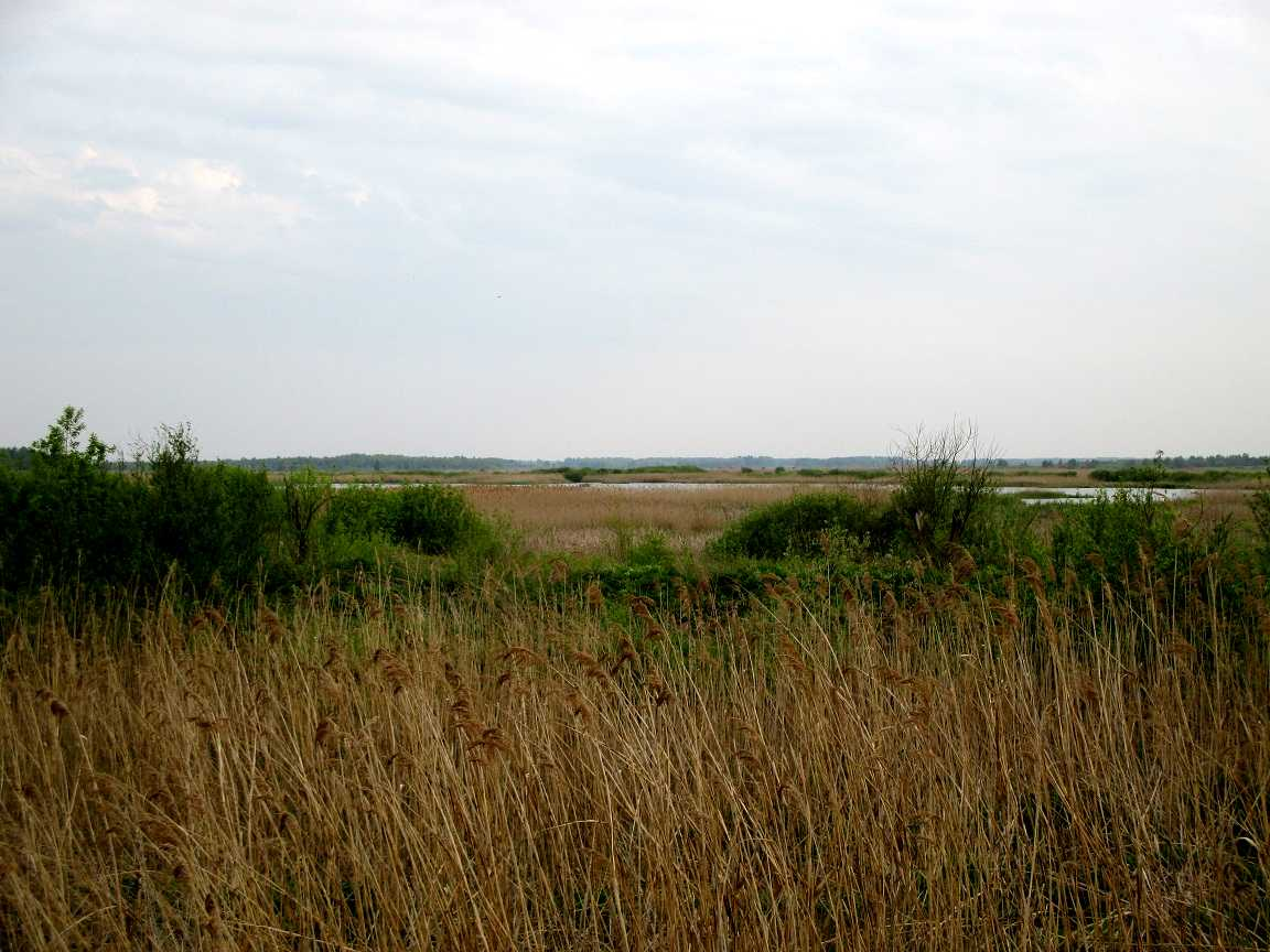 Дзітвянскае балота